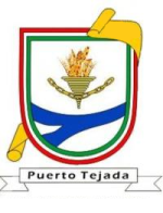 Replica del escudo de Puerto Tejada creada con el Gimp.